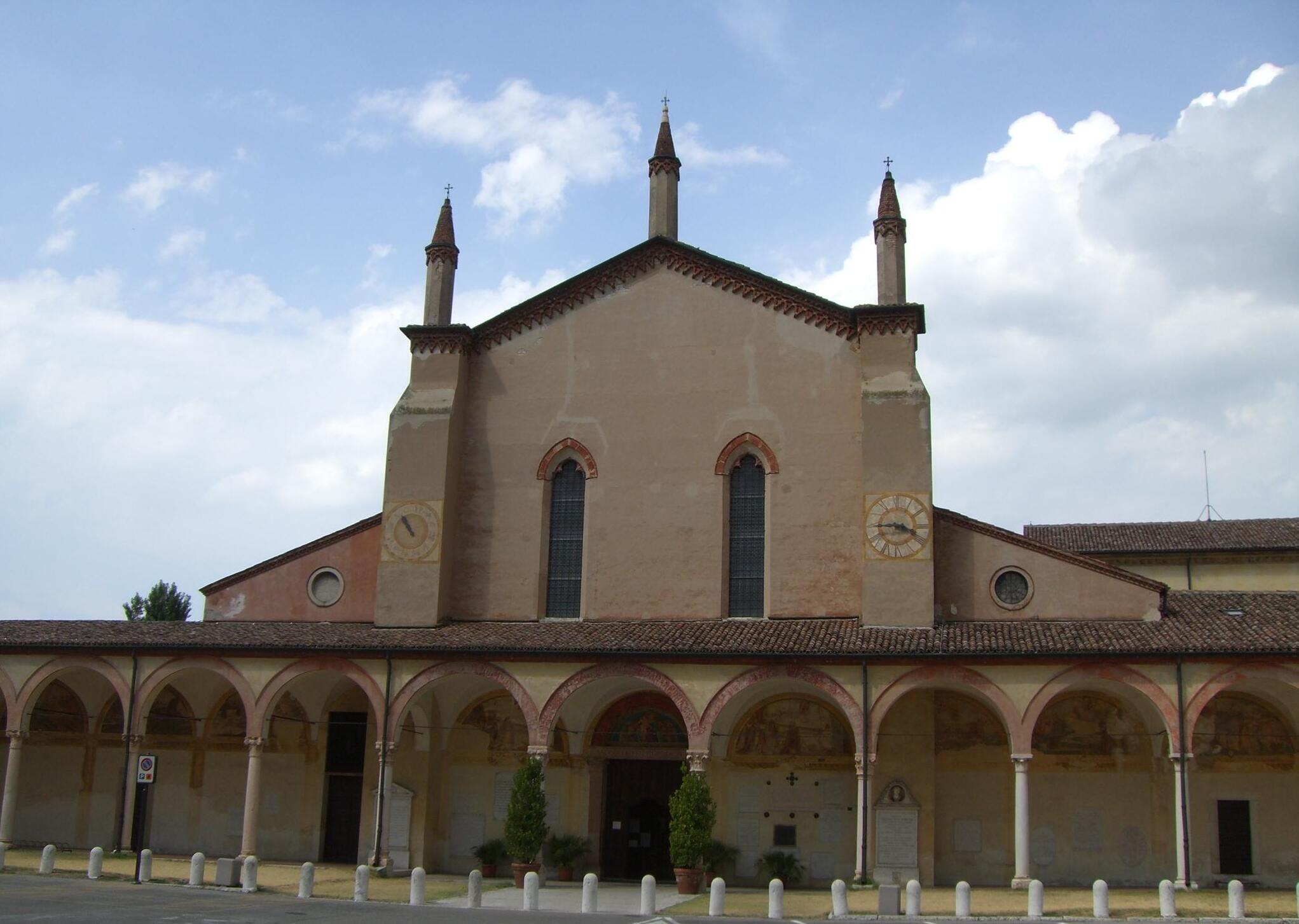 autore: Giovanni Bufalo